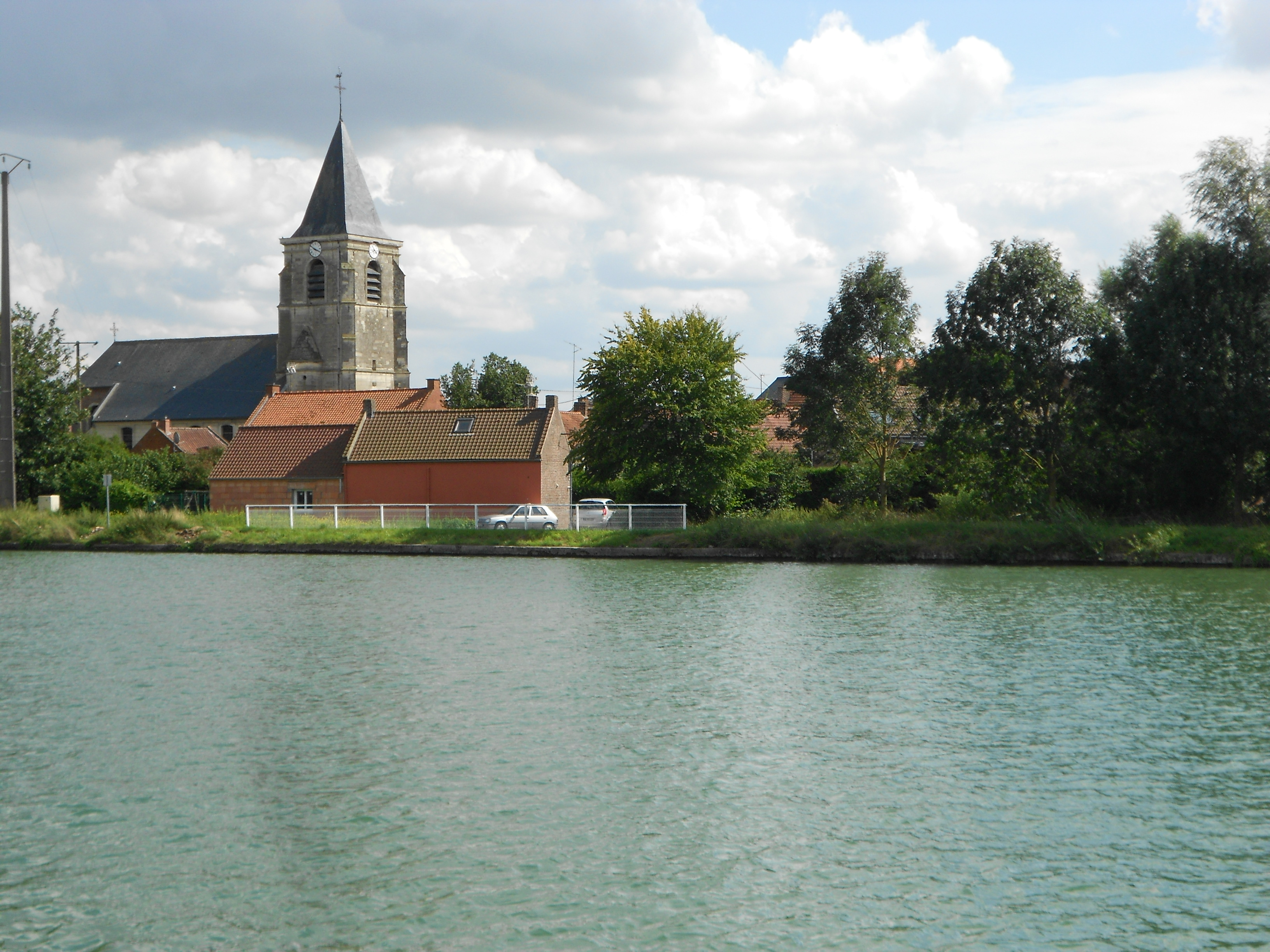 Eglise de Hem-Lenglet et la canal de la Sensée